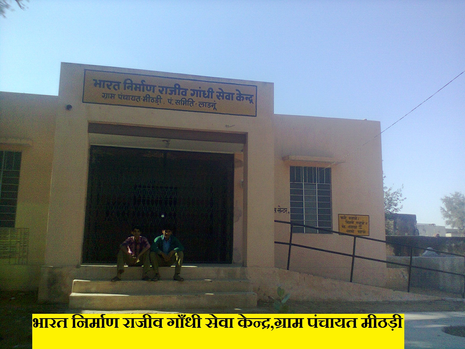 भारत निर्माण राजीव गाँधी सेवा केन्द्र ग्राम पंचायत - मीठड़ी मारवाड़